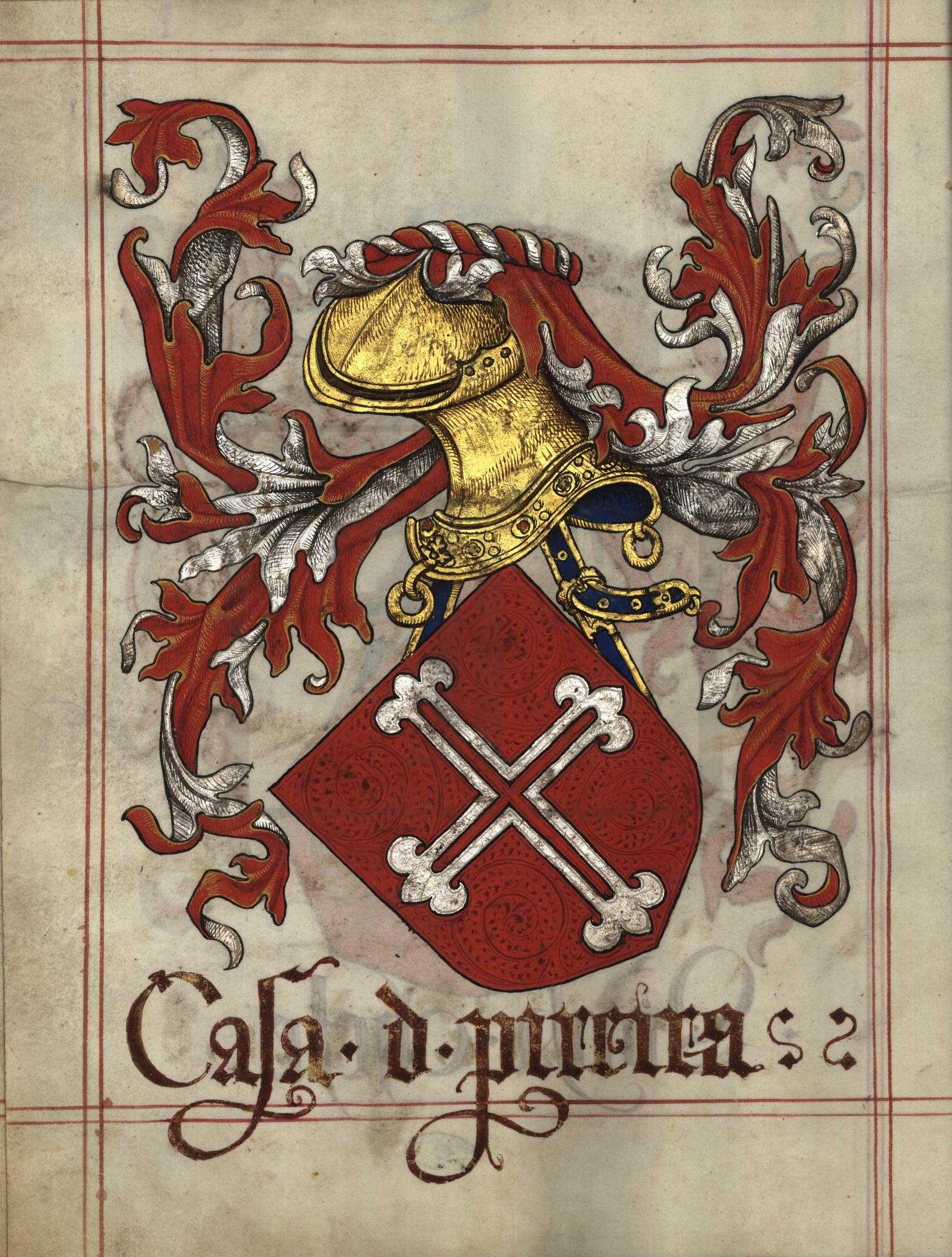 Livro do Armeiro-Mor, Pereira (fl 52v)